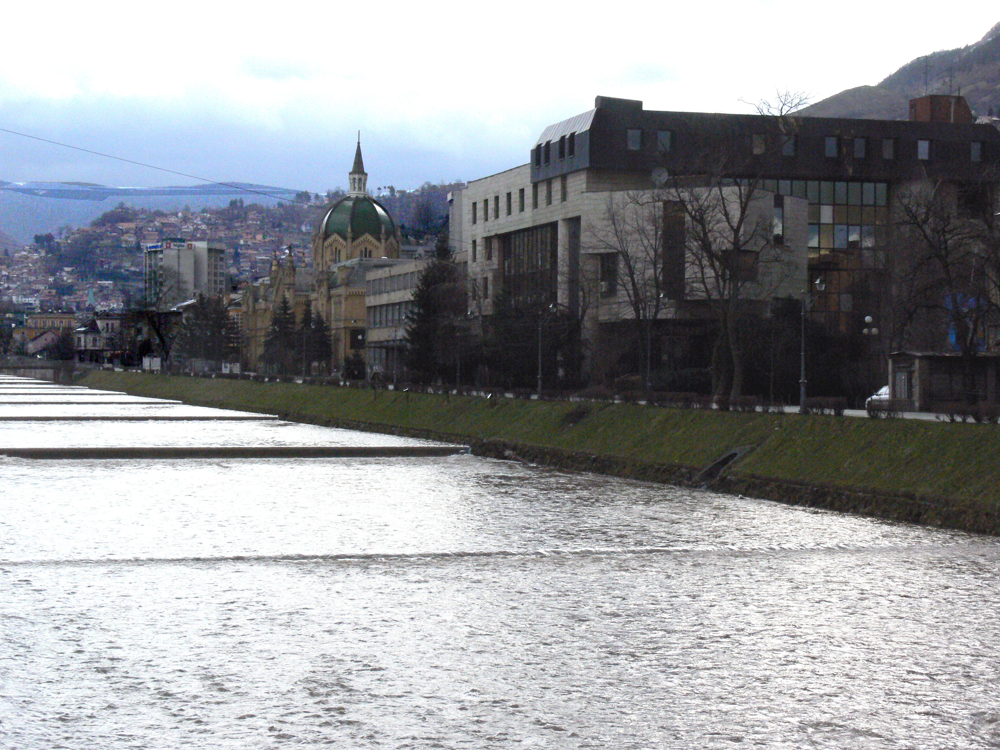 The river Miljacka in Sarajevo.